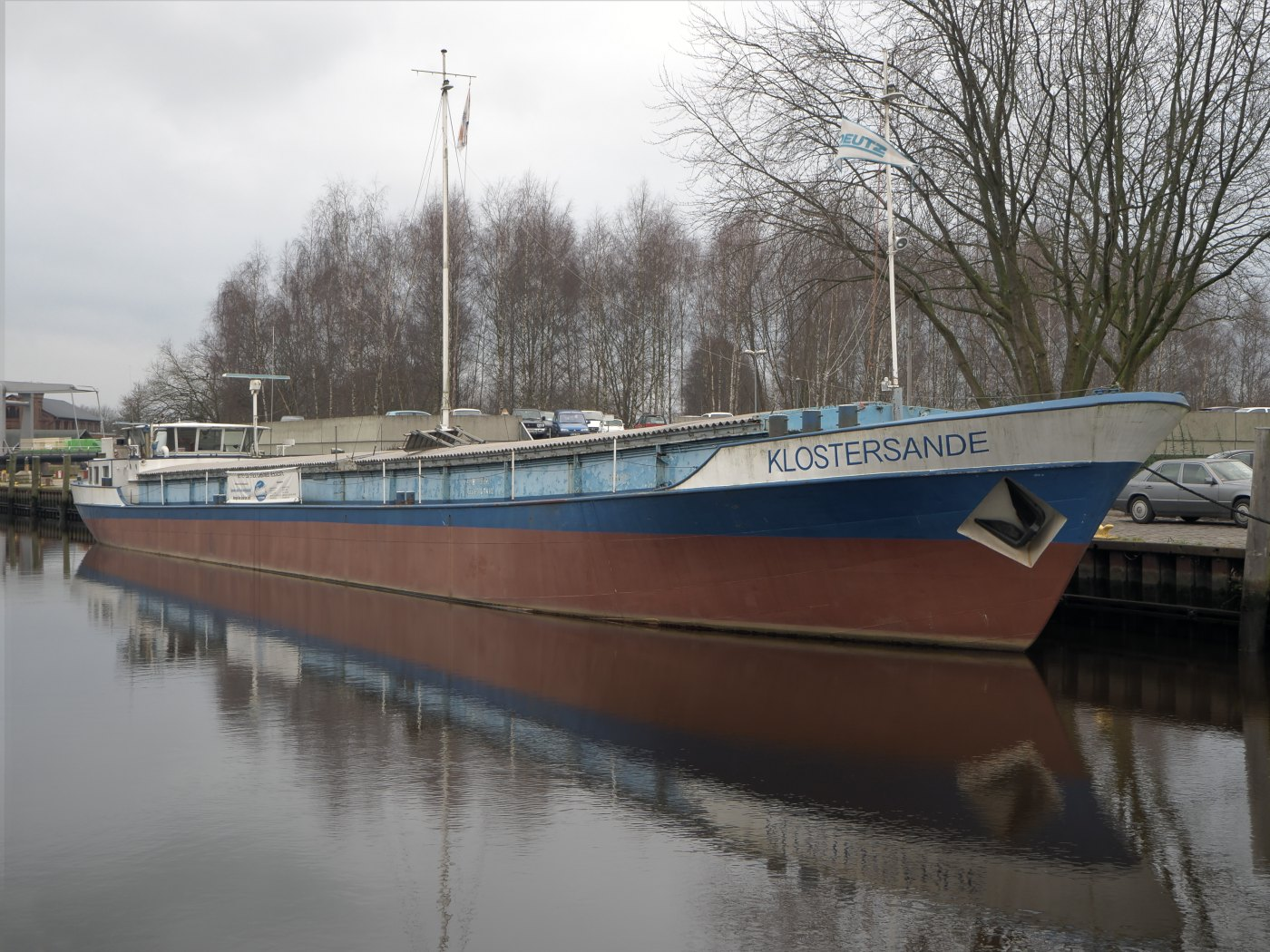 Elmshorn (Schleswig-Holstein), Binnenschiff Klostersande im Elmshorner Hafen, Foto 2015